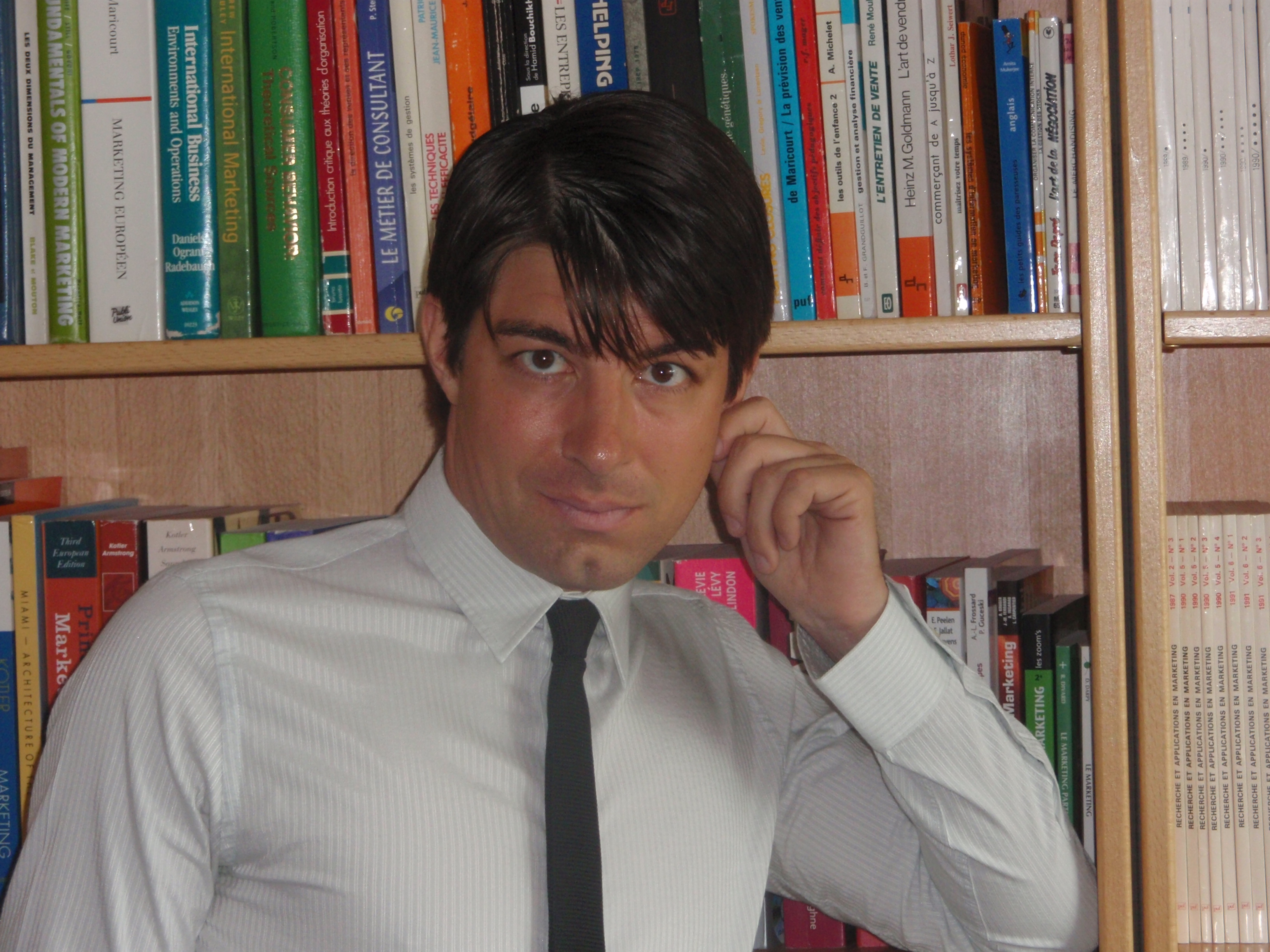 Andreas Kaplan